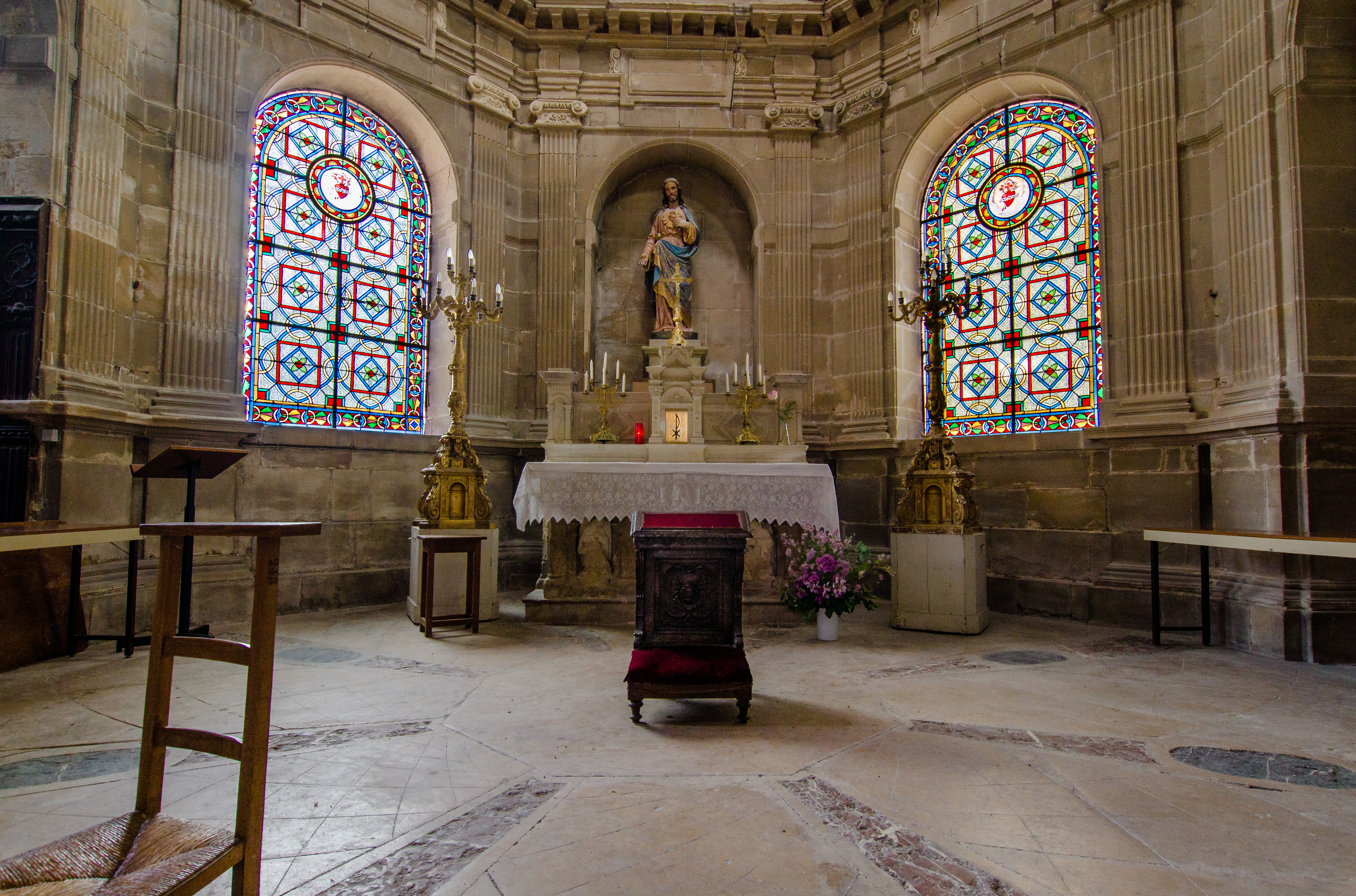 Une chapelle de l'église de Marines